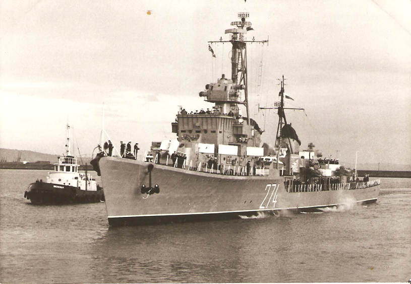 Niszczyciel - ORP Wicher na którym służyłem w latach 1970r/1973r